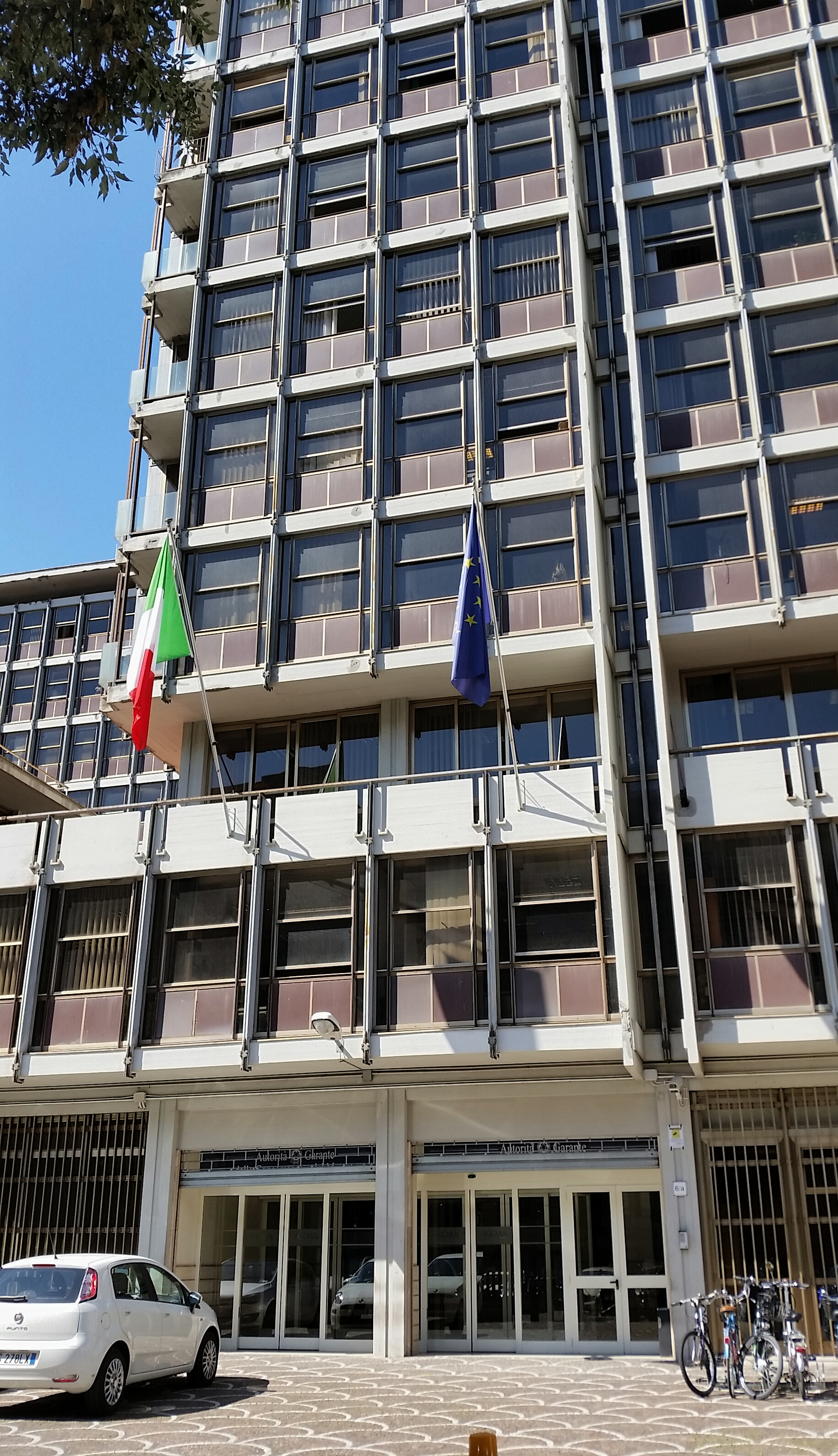 Sede AGCM, Antitrust Italiana